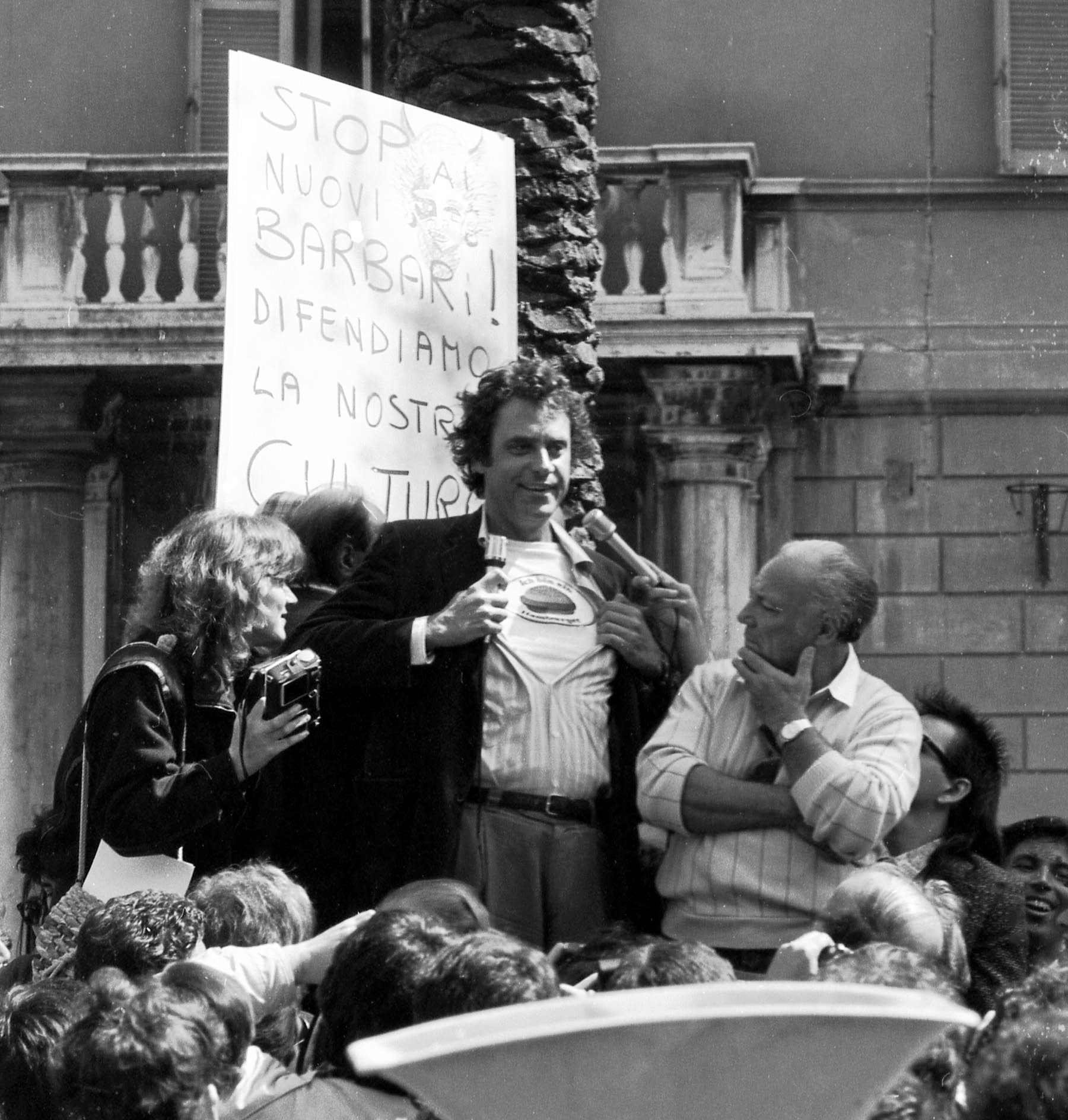 Renato Nicolini e Claudio Villa alla Manifestazione anti fastfood Roma 1986